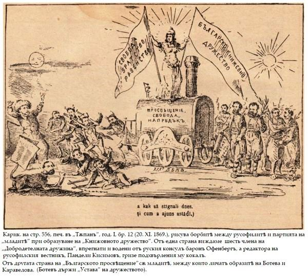 Карикатура, отпечатана на страница 556 в брой 12 от година първа 20 ноември 1869 на вестник "Тъпан". Рисува борбите между русофилите и партията "Млада България" при образуването на "Книжовното дружество". От една страна са шест члена на Добродетелната дужина, впрегнати от руския консул Хенрих Офенберг, а Пандели Кисимов гризе кокал. От другата страна са "Младите", сред които са Любен Каравелов и Христо Ботев с Устава на дружеството.